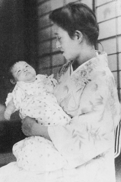 Yuki Ōtō (Japanese, *1910, †2001)